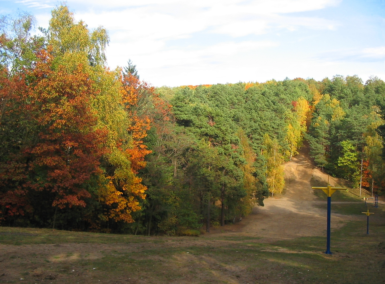 Góra Tatrzańska w Zielonej Górze Author: Mohylek 16:03, 28 March 2007 (UTC)